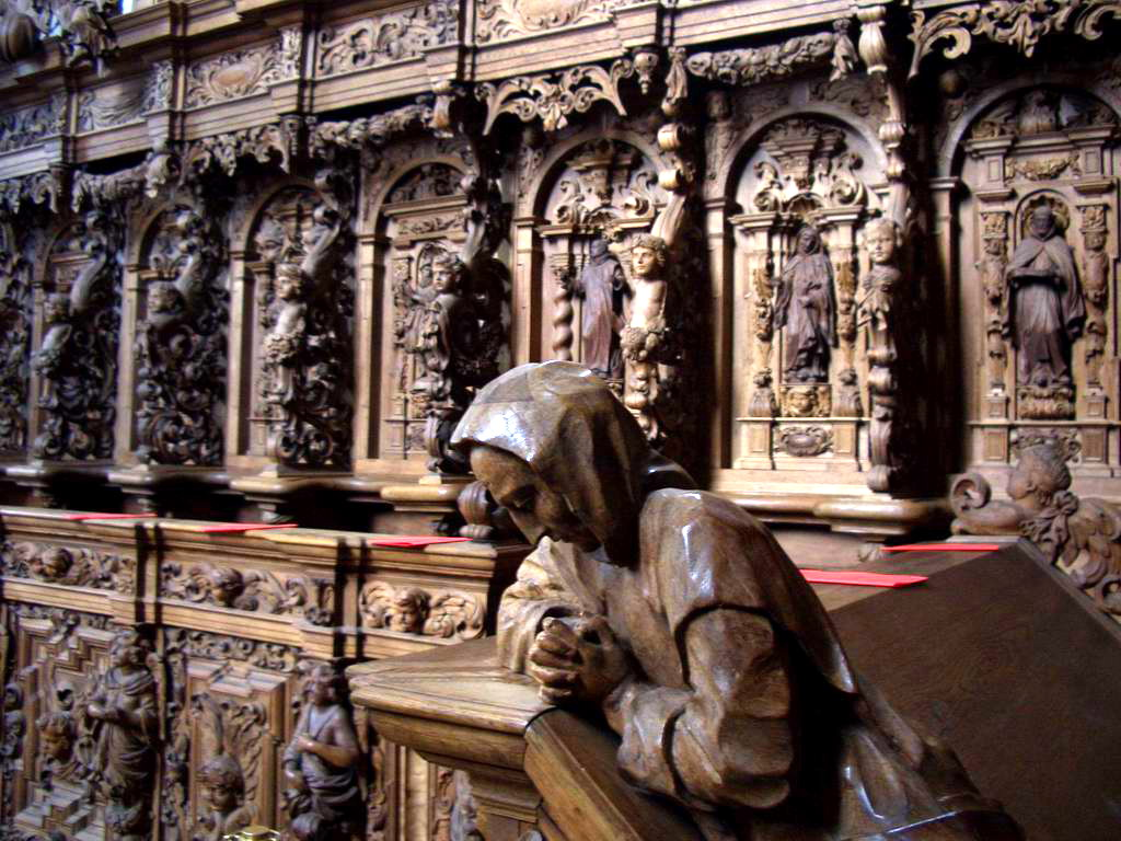 Chorgestühl mit Schnitzereien in Kloster Buxheim